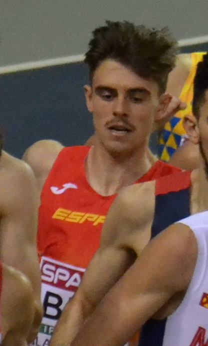 Mens 1500m